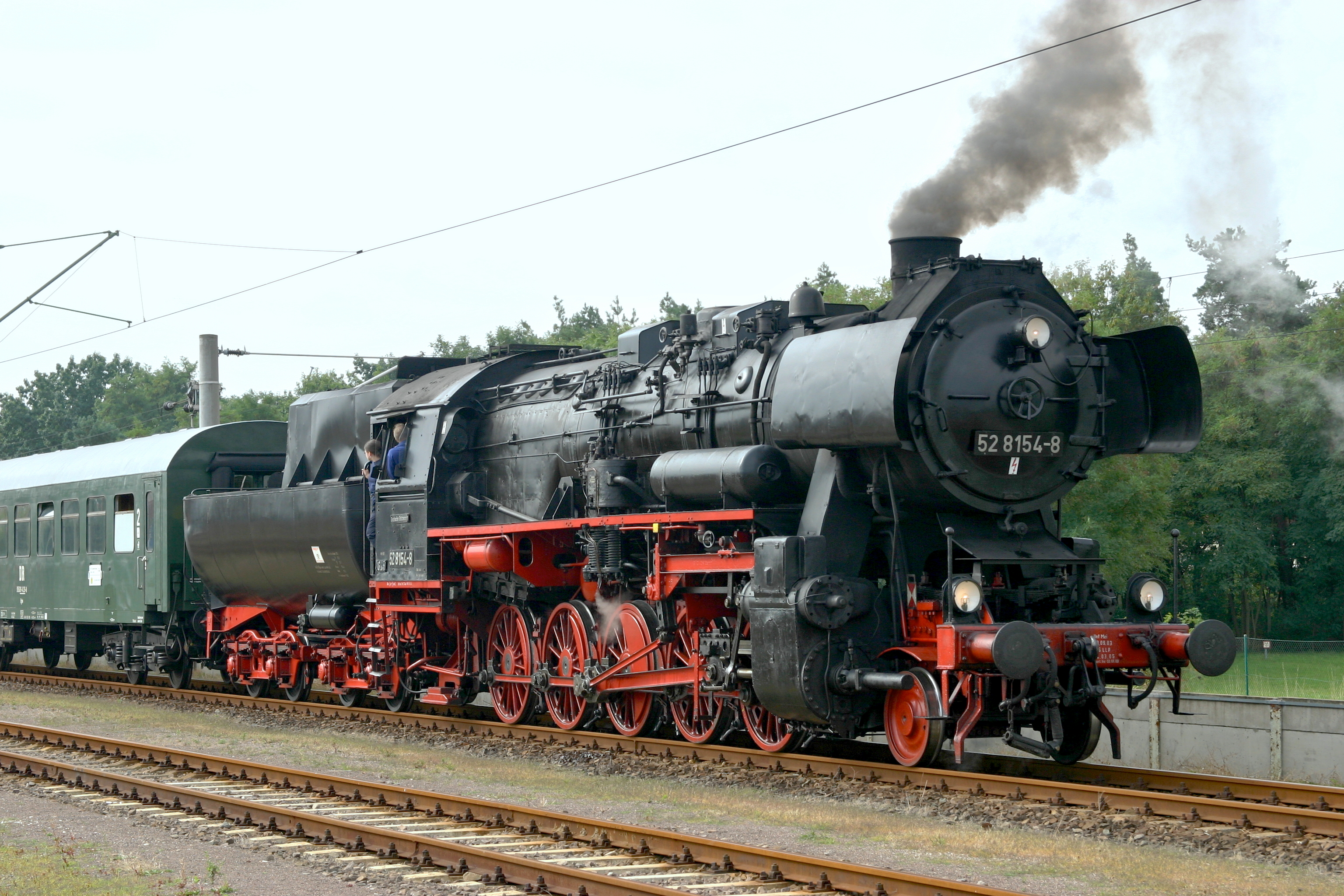 Dampflokomotive 52 8154 in Delitzsch.